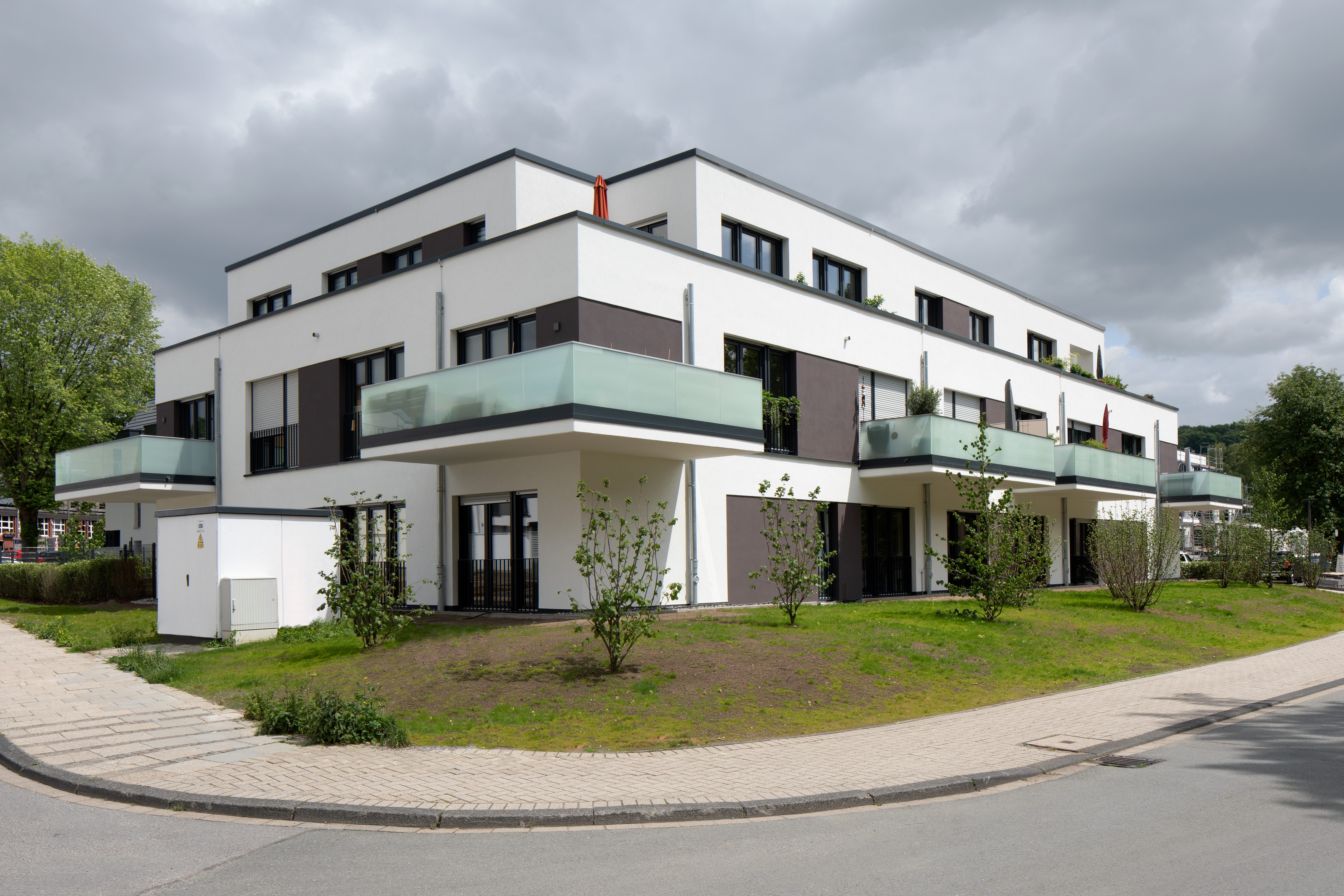 Demenz-WG